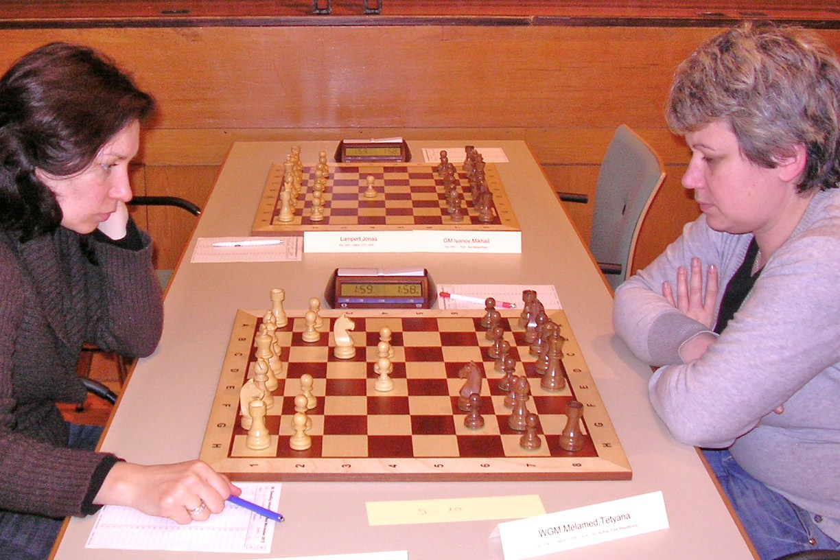 Tatjana Vasilevich - Tetyana Melamed, 28. ChessOrg Schachfestival 2012 in Bad Wörishofen.